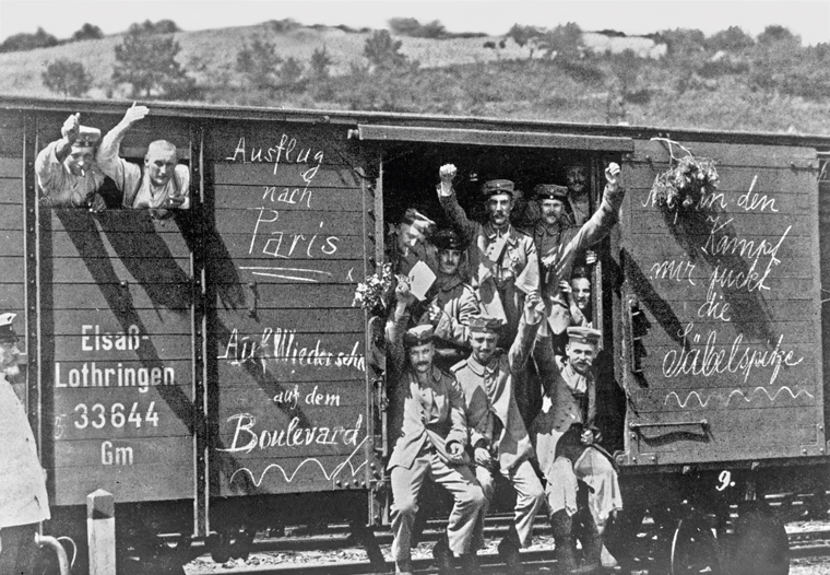 Soldaten verlassen die Familien, um das Vaterland zu dienen und zu beschützten. Die Aufschriften am Wagon dokumentieren die allgemeine Erwartung eines kurzen Krieges. Propagandabild der soldatischen "Kriegsbegeisterung".